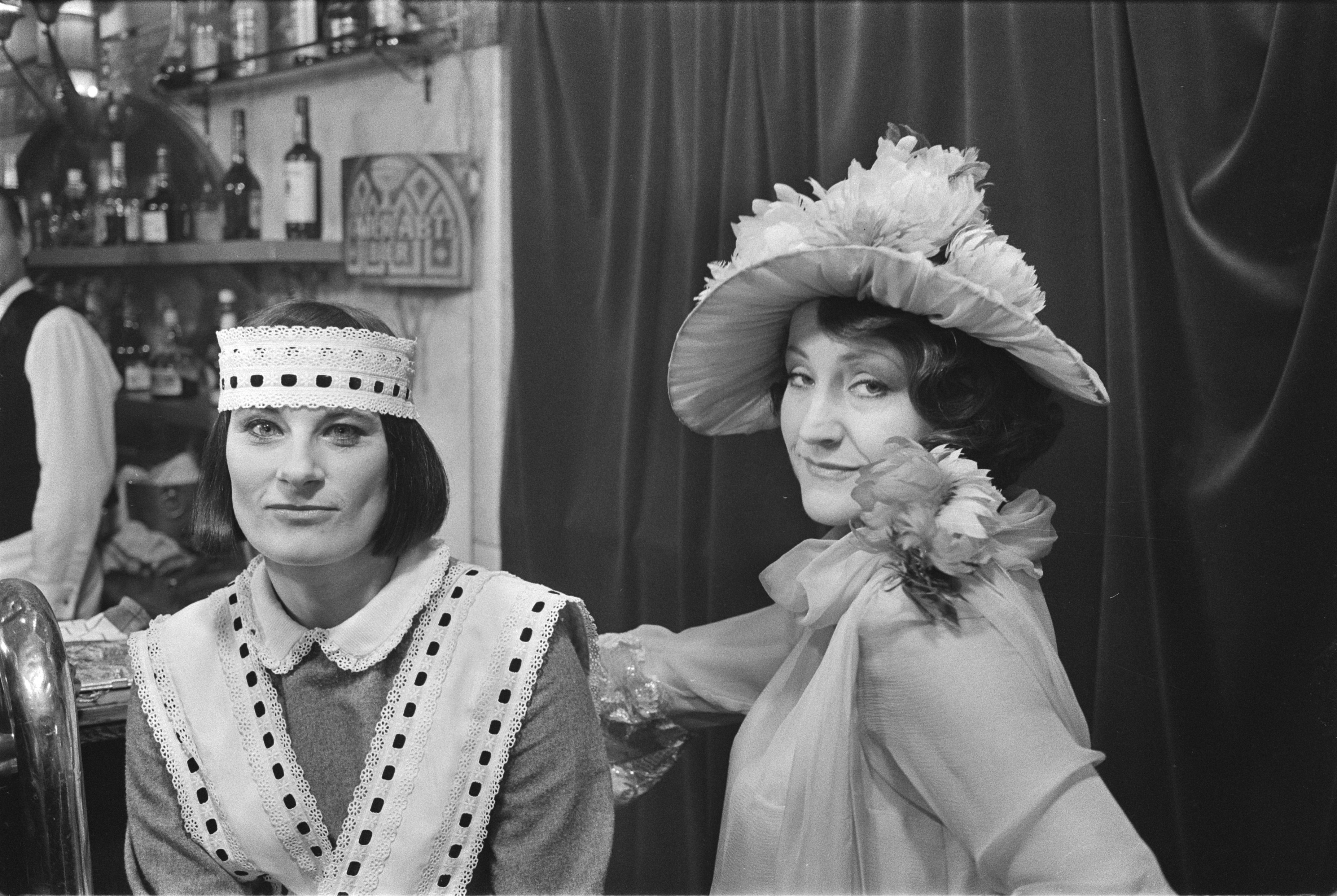 Collectie / Archief : Fotocollectie Anefo Reportage / Serie : [ onbekend ] Beschrijving : TV-opnamen Fien de la Mar ( Jasperina de Jong ) in Schillersbar (Amsterdam) en opdracht Audet Datum : 21 maart 1984 Locatie : Amsterdam, Noord-Holland Trefwoorden : TV-opnamen Persoonsnaam : Jong, Jasperina de Instellingsnaam : Audet Fotograaf : Antonisse, Marcel / Anefo Auteursrechthebbende : Nationaal Archief Materiaalsoort : Negatief (zwart/wit) Nummer archiefinventaris : bekijk toegang 2.24.01.05 Bestanddeelnummer : 932-9051